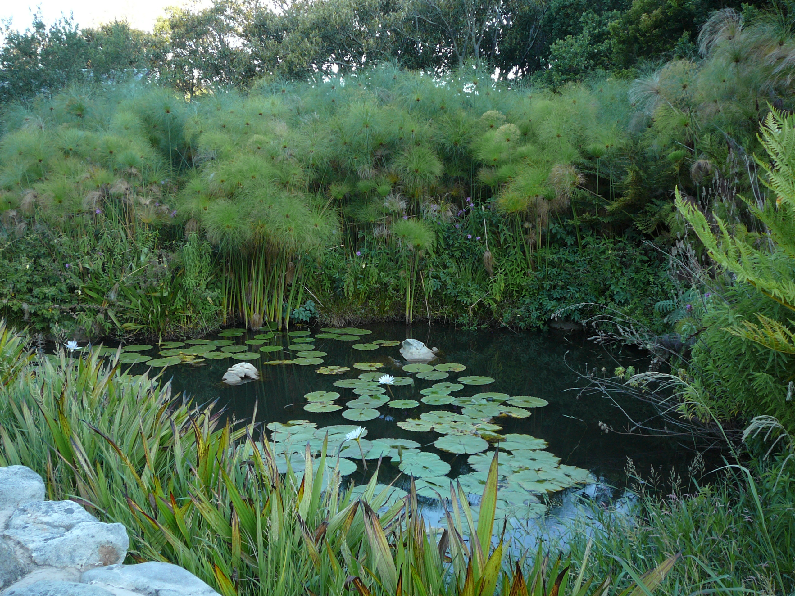 Papyrus